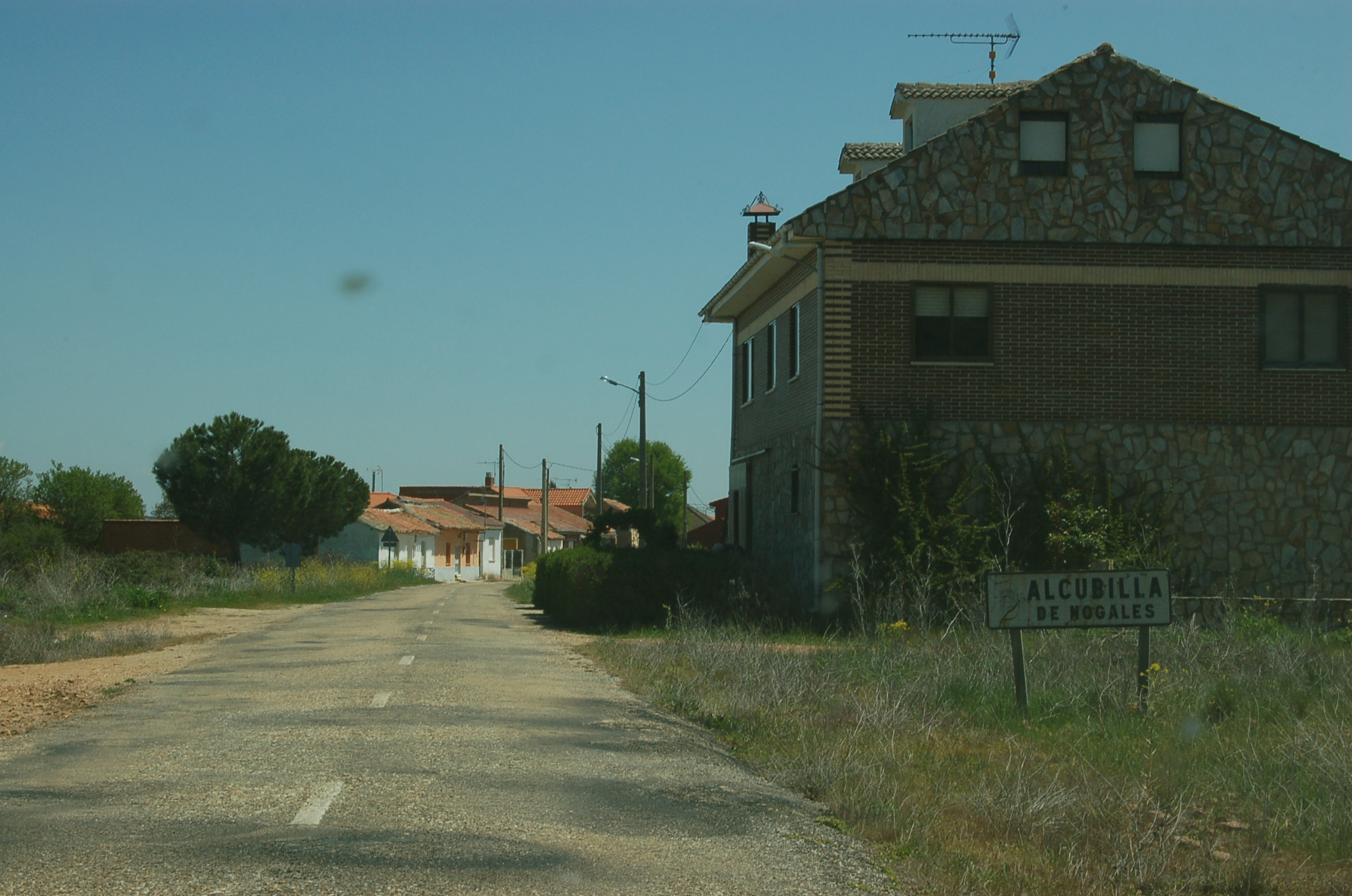 Entrada a Alcubilla de Nogales desde a estrada ZA-P-1511